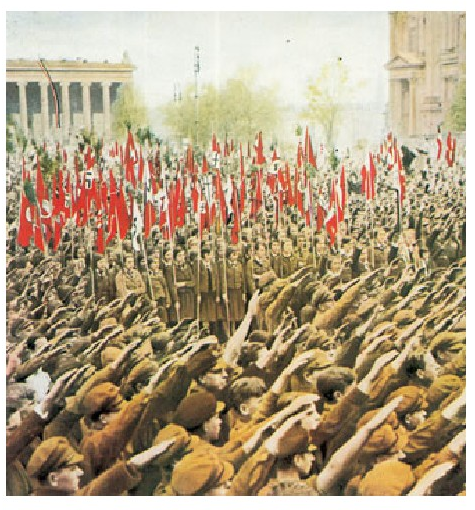 Berlingo desfile baten irudia (1936).